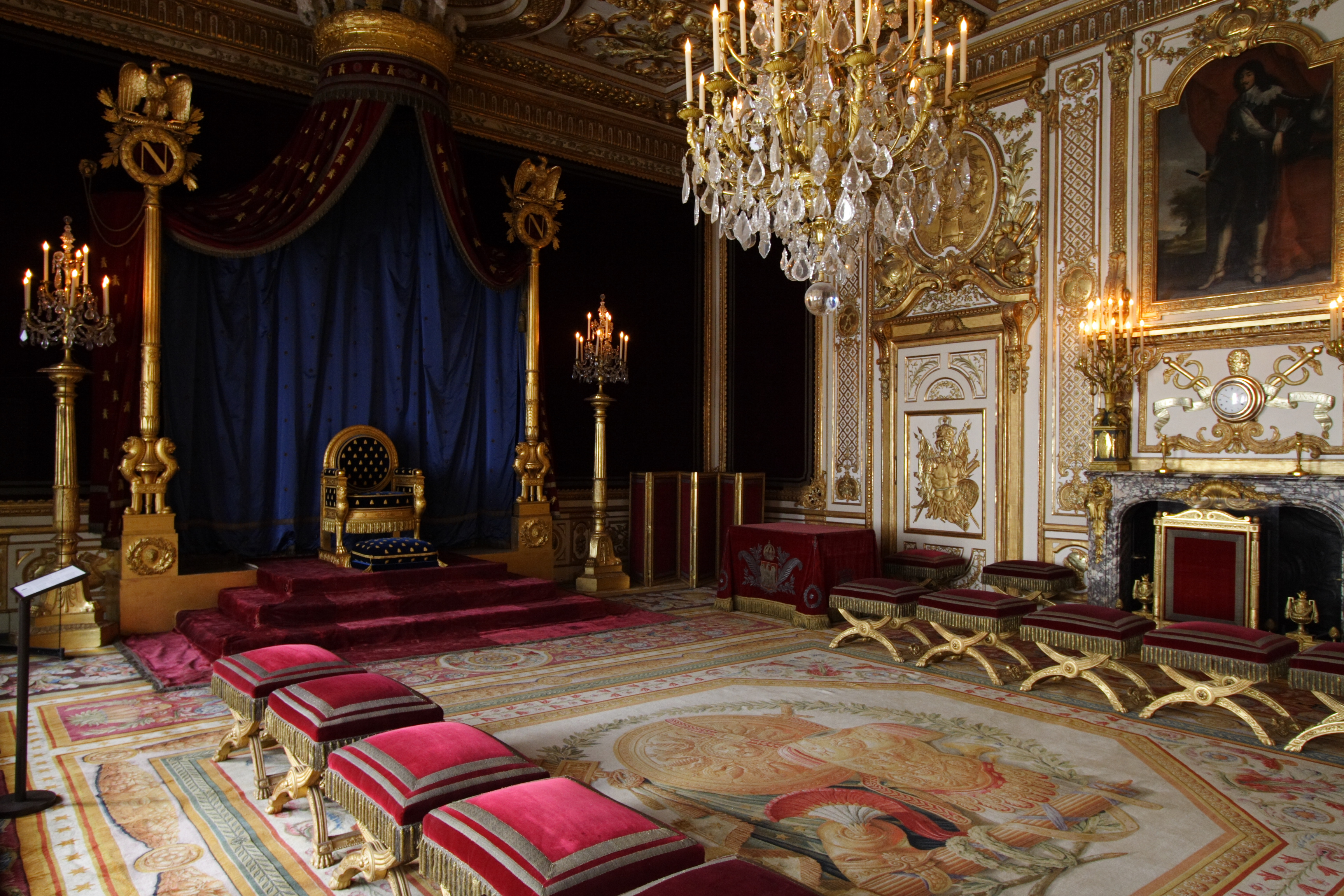 Thronsaal im Schloss Fontainebleau